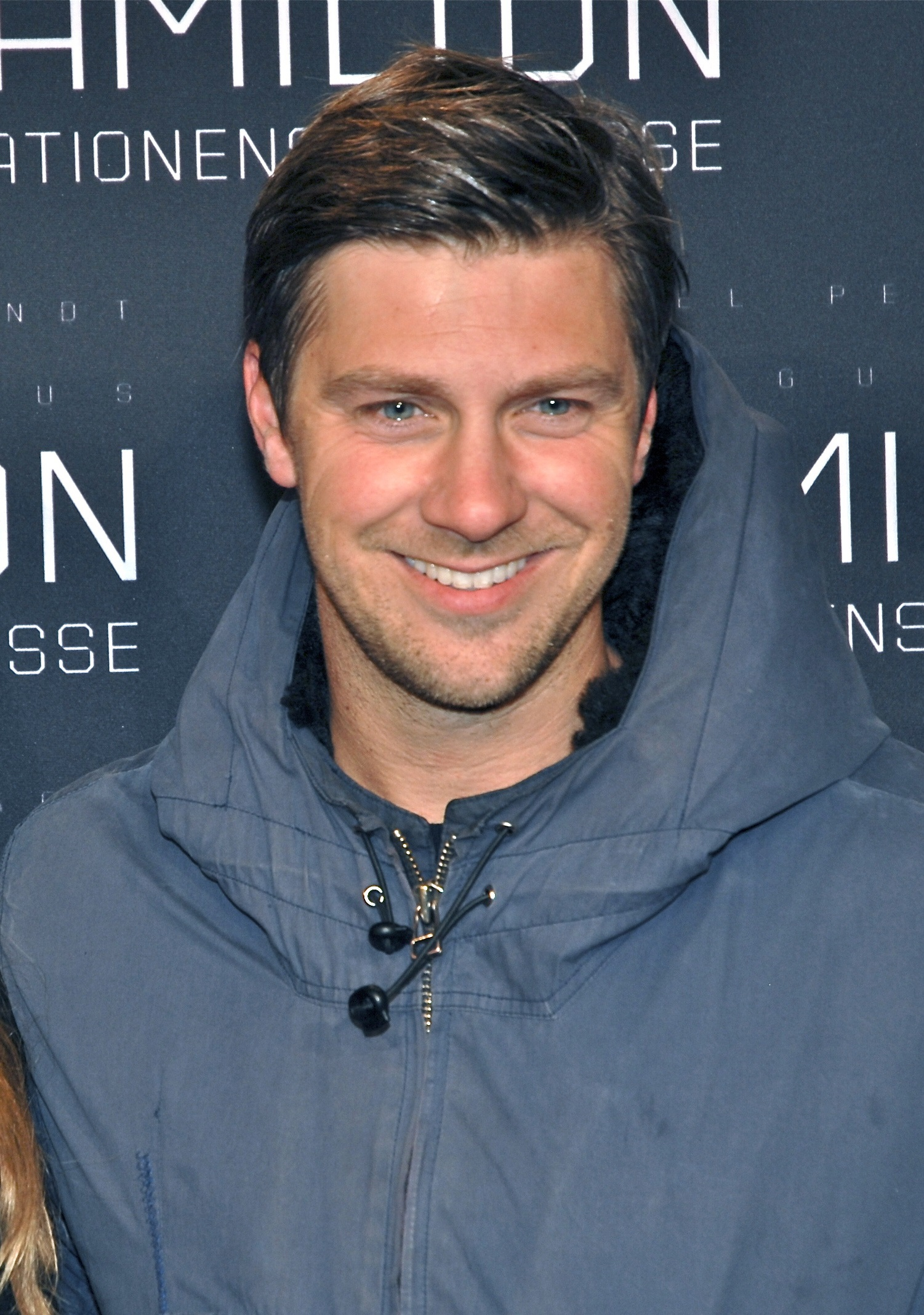 Linus Wahlgren på galapremiären av Hamilton - I nationens intresse, på biograf Sergel i Stockholm den 9 januari 2012.